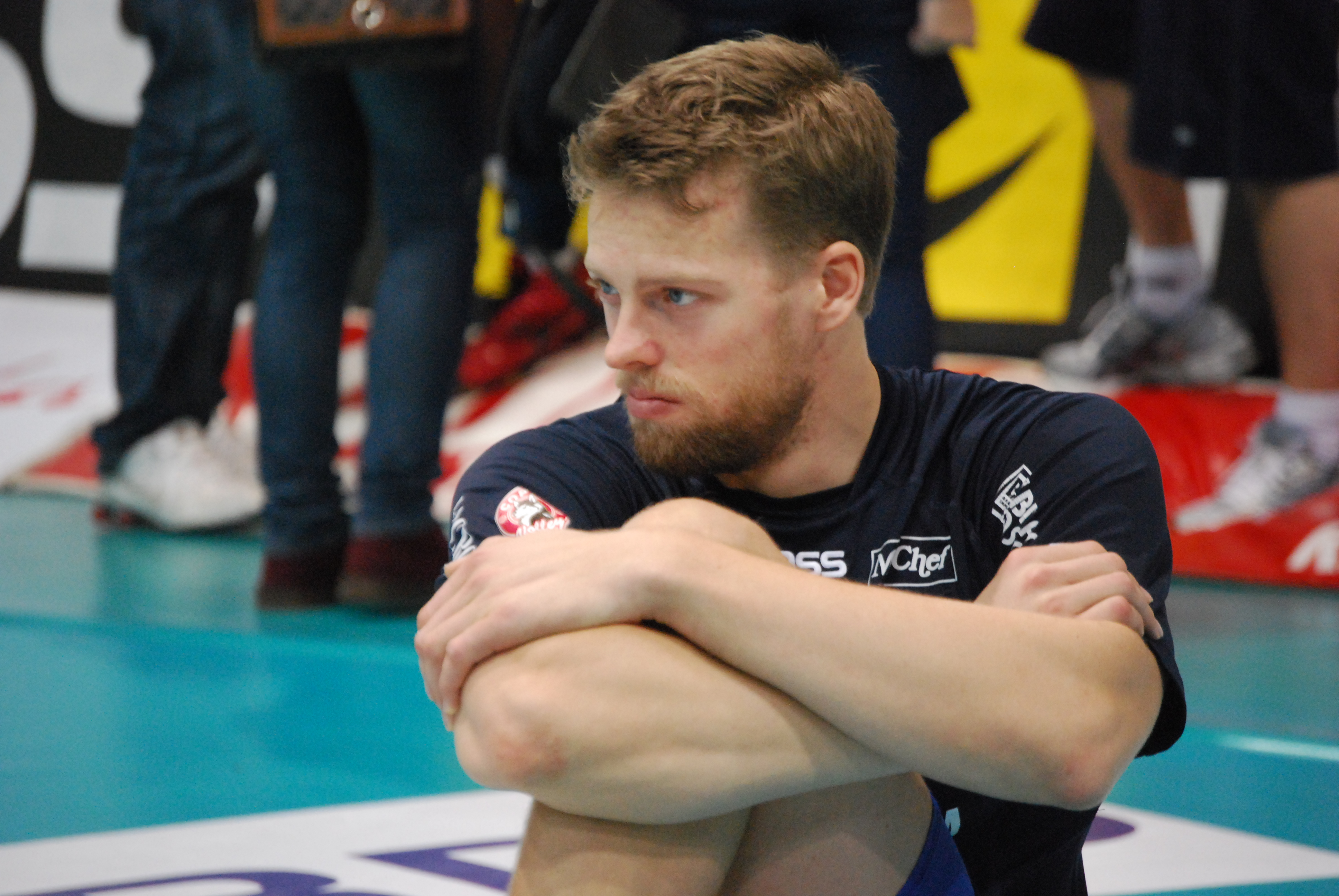 Foto scattata da me al Palabanca Piacenza.